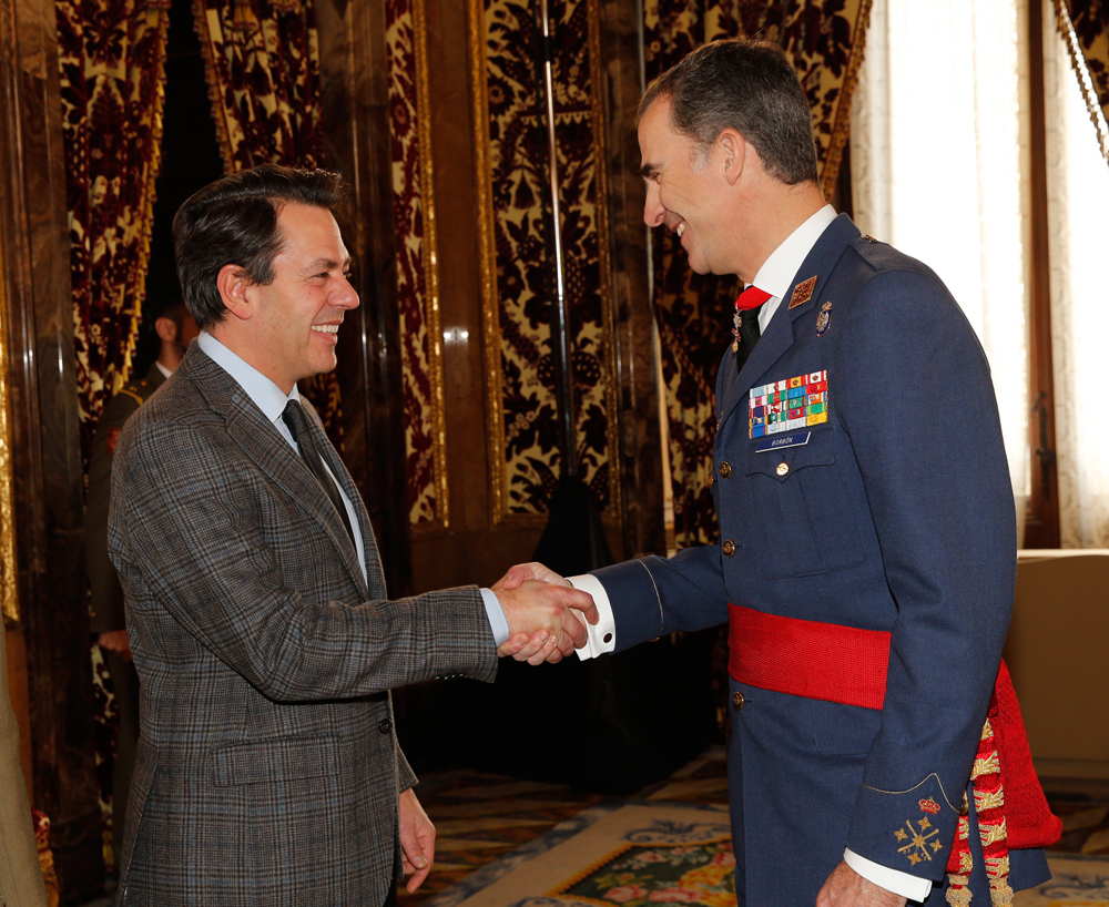 Recepción pintor A.Ferrer-Dalmau, con Rey Felipe VI